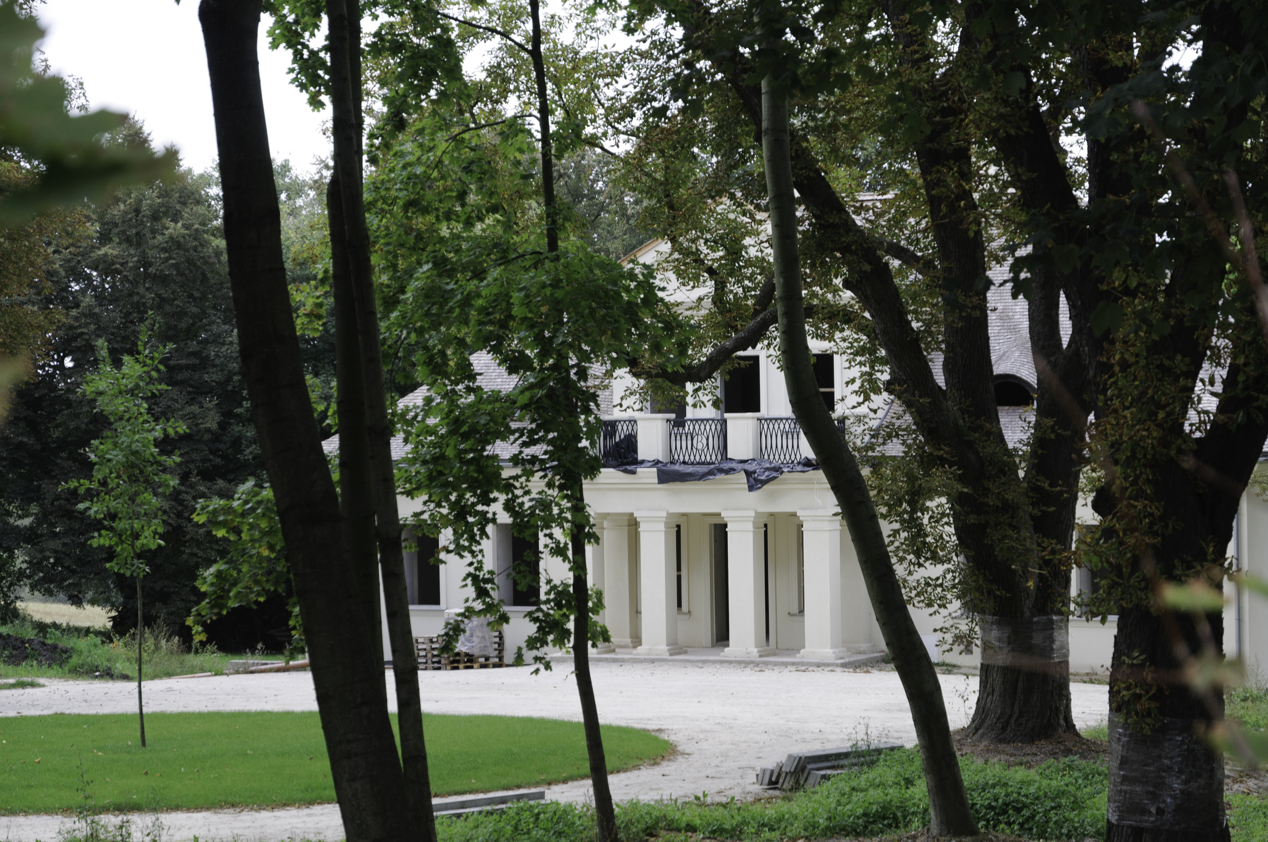 Dąbie - zespół dworski (1848)